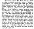 Artikel in der Zeitschrift "Der Israelit" vom 7. Februar 1901